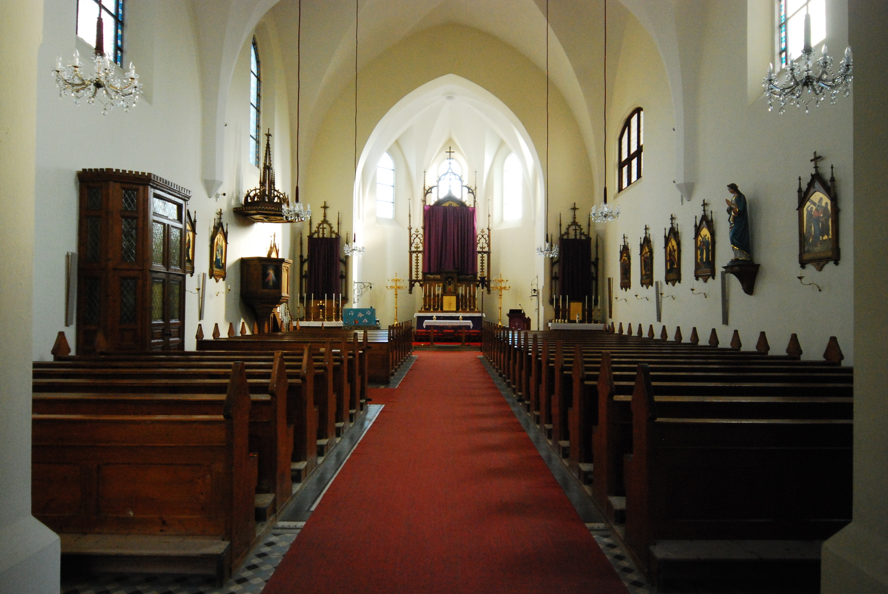 katholische Pfarrkirche heiliger Markus